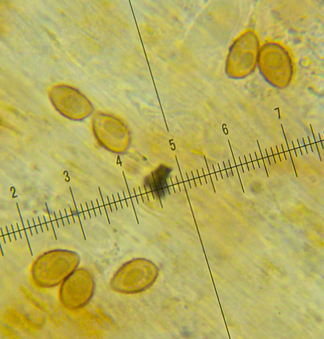 Galerina vittiformis f. tetraspora Arnolds